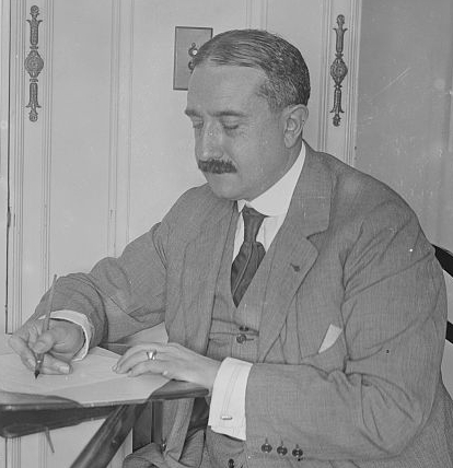 French journalist Stéphane Lauzanne (1874-1958)